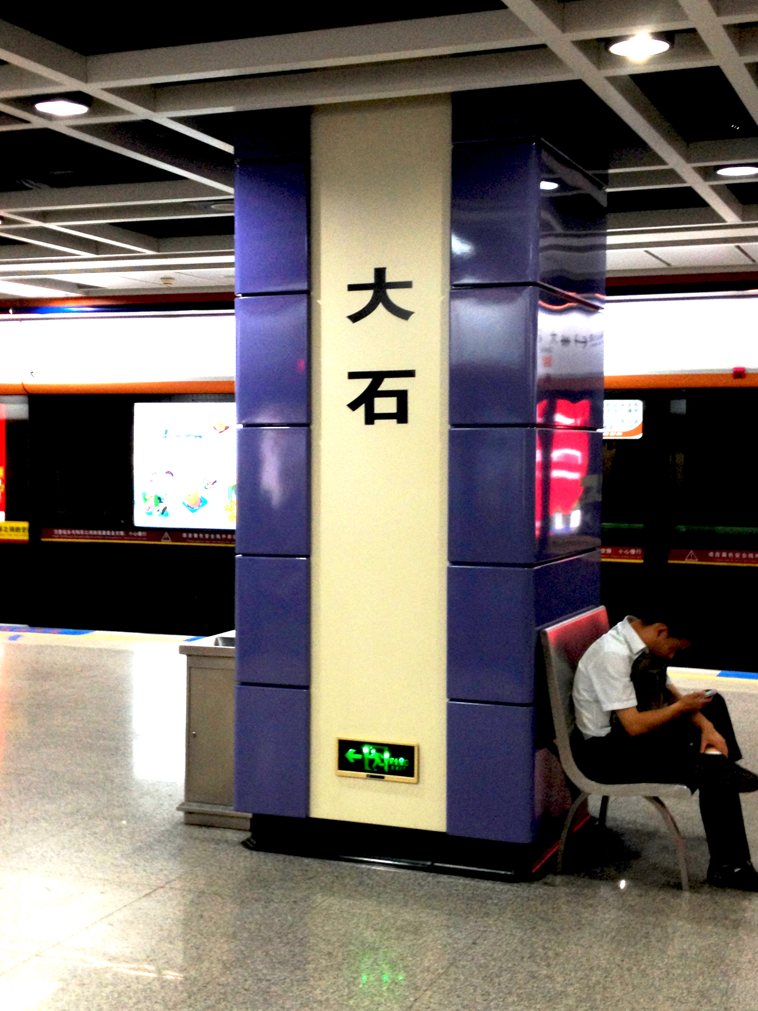 广州地铁大石站柱上面的站名